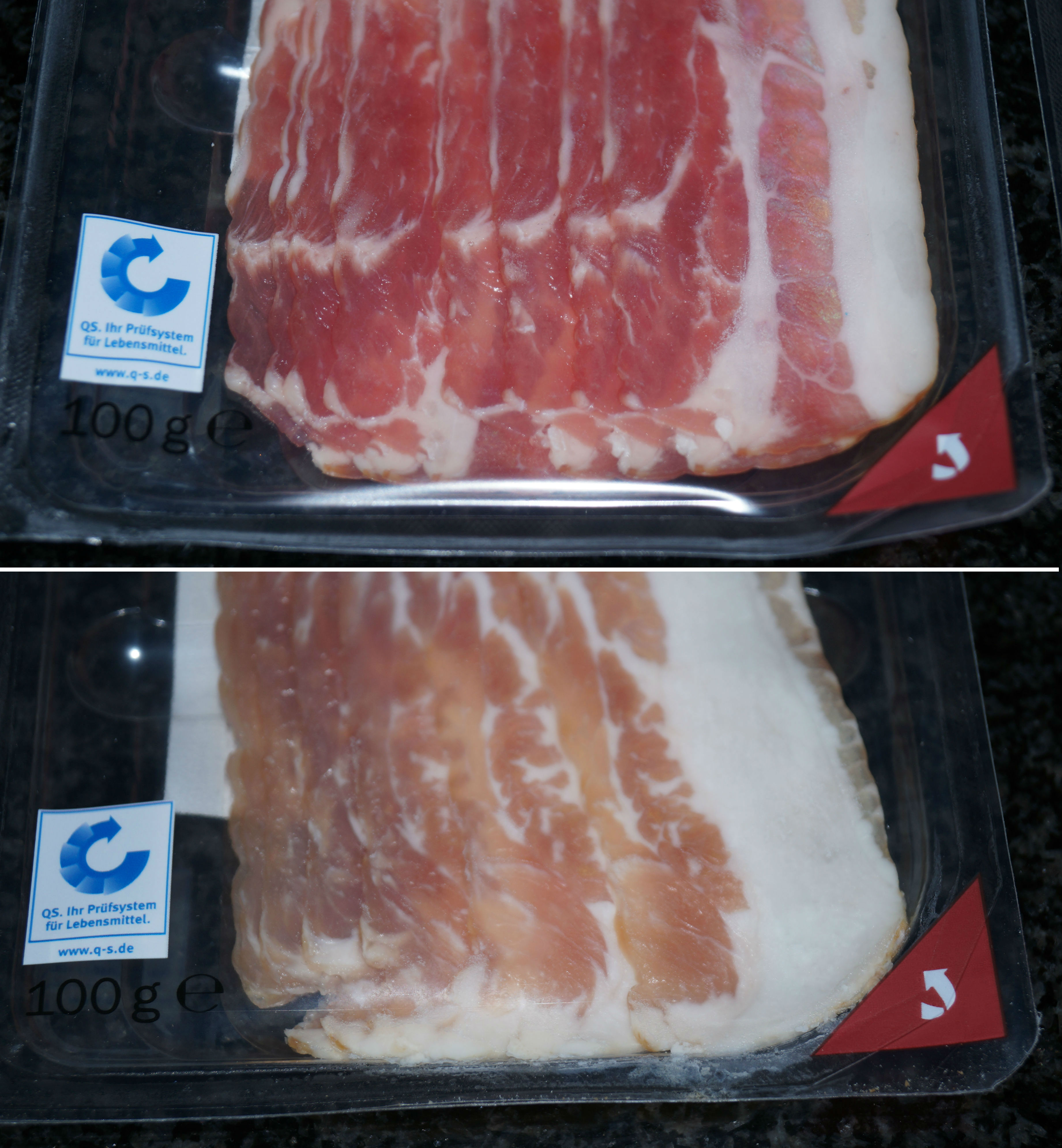 Lebensmittelverpackung mit intakter Verpackung (oben) und Produkteinlagerung in Siegelnaht (unten). Durch die undichte Siegelnaht ist Luft in die Verpackung geströmt, die zur Verfärbung des Specks geführt hat.